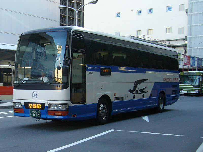 広島バスセンター(Hiroshima bus center)にて撮影 登録番号 広島200か・698 中国ジェイアールバス(Chugoku JR bus)広島支店所所属 広島昼特急京都号・広島ドリーム京都号用 いすゞ・ガーラ KL-LV781R2